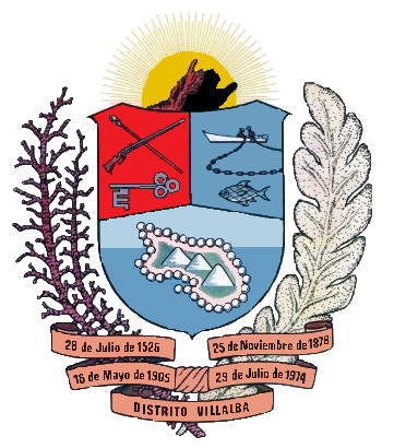 Escudo del Municipio Villalba. Isla de Coche. Estado Nueva Esparta. Venezuela